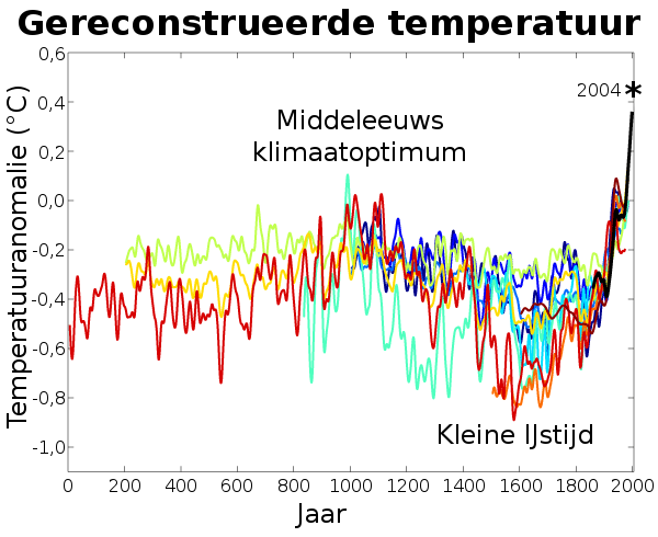 Nederlandstalige versie van File:2000 Year Temperature Comparison.png